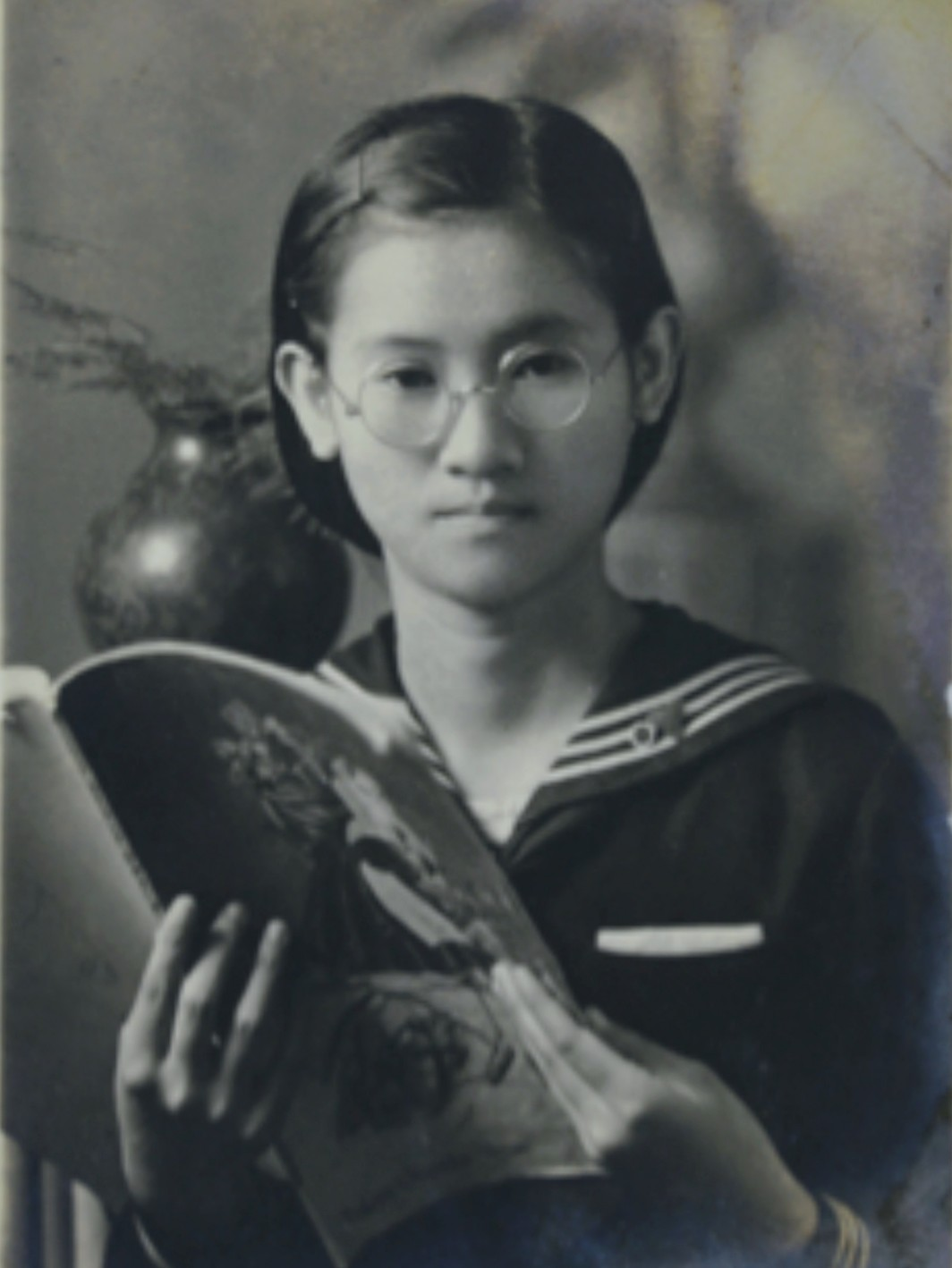 中文（台灣）: 高二時的丁窈窕